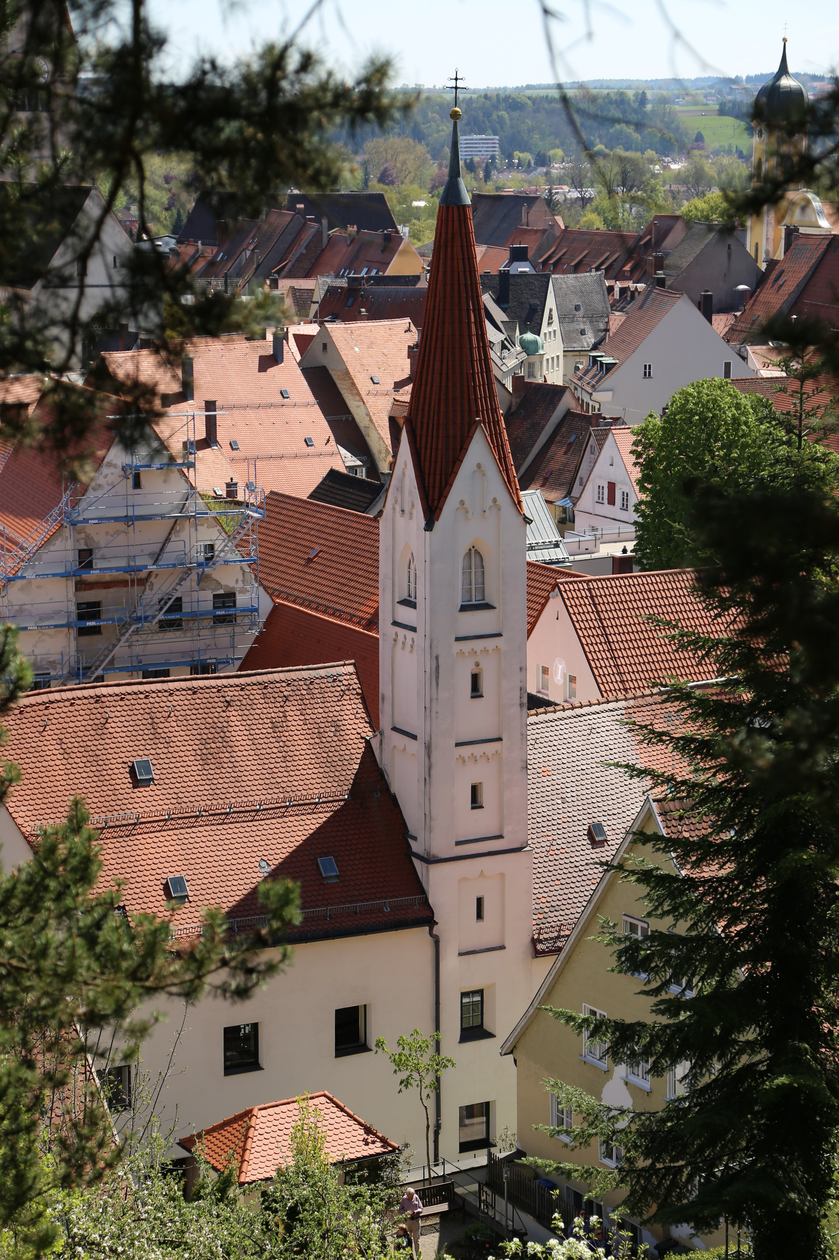 Crescentiaplatz 11, Kaufbeuren; Franziskanerinnenkloster St. Franziskus